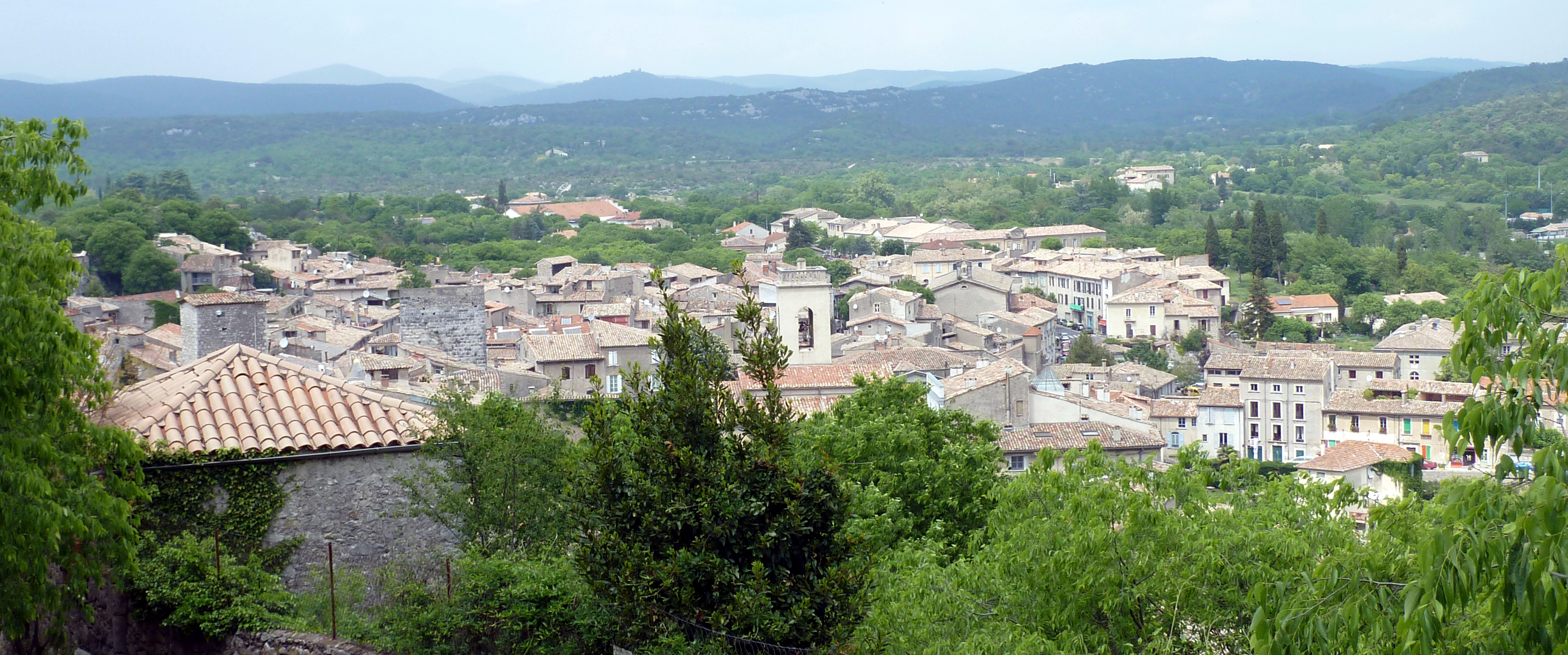 Vue d'ensemble de Sauve, commune située dans le Gard (France).